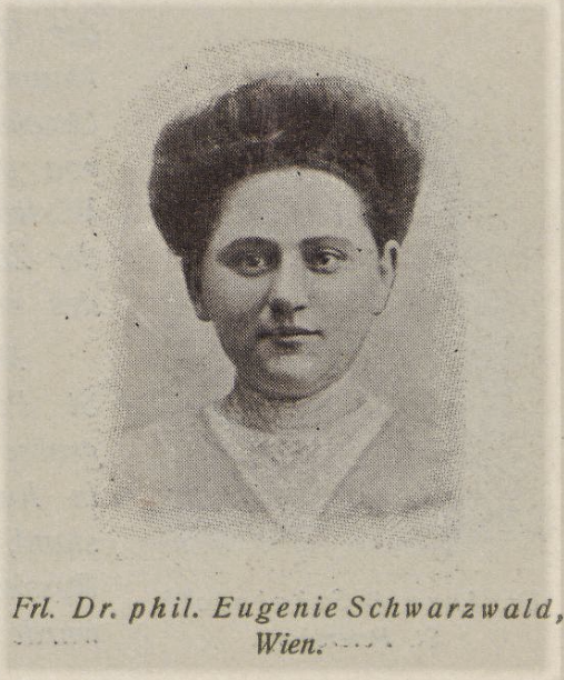 Frl. Dr. phil. Eugenie Schwarzwald, Wien.